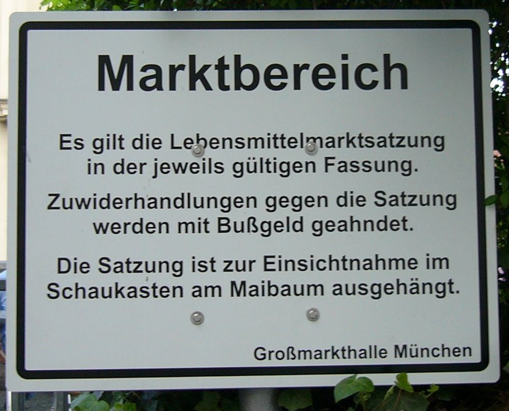 Hinweisschild Lebensmittelmarktsatzung Viktualienmarkt München